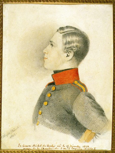 Барон Боде-Колычёв, Михаил Львович (1824-1888).